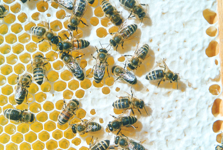 Bienen auf teilweise verdeckelter Honigwabe